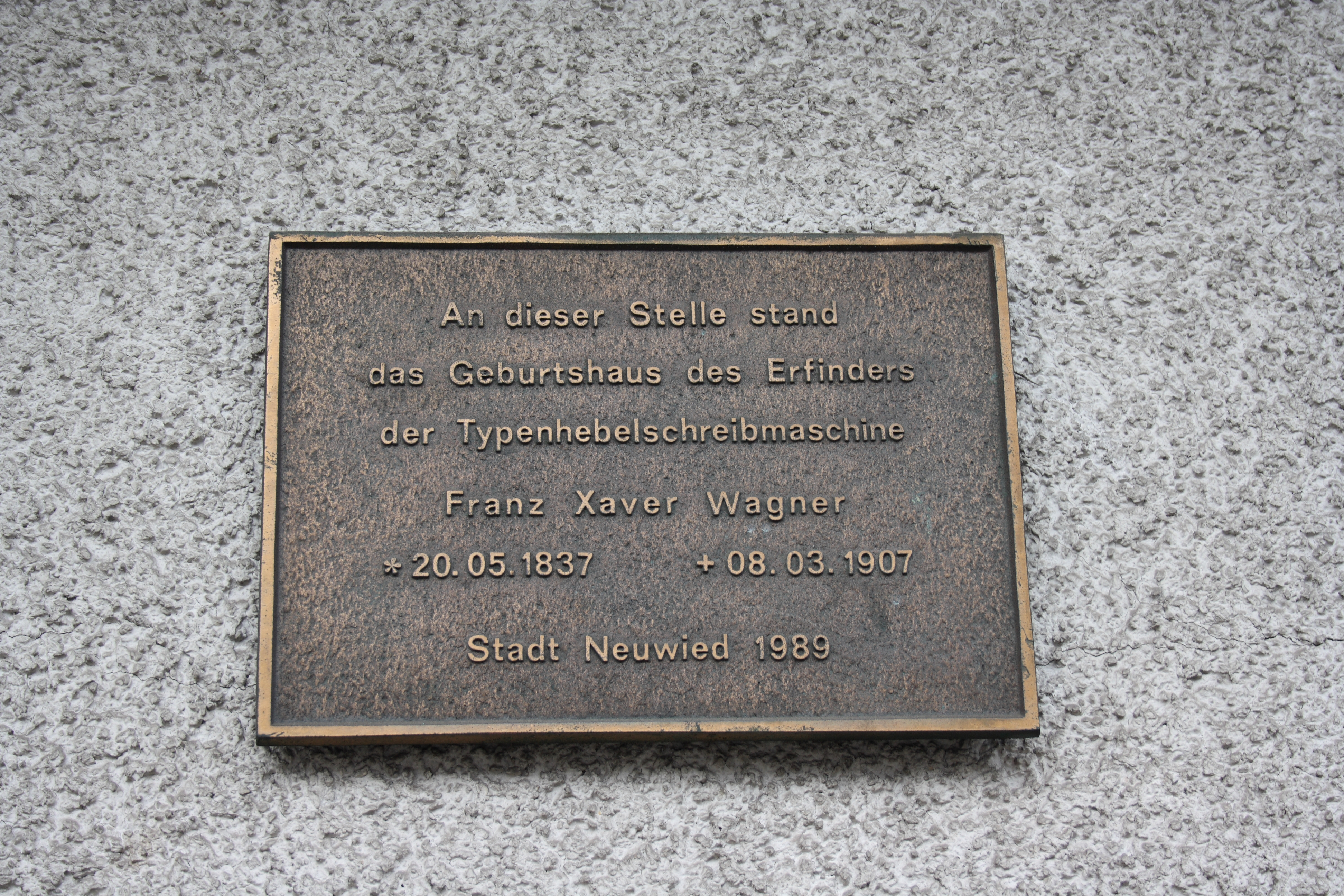 Gedenktafel für Franz Xaver Wagner in Heimbach-Weis, einem Stadtteil von Neuwied, Hauptstraße 92